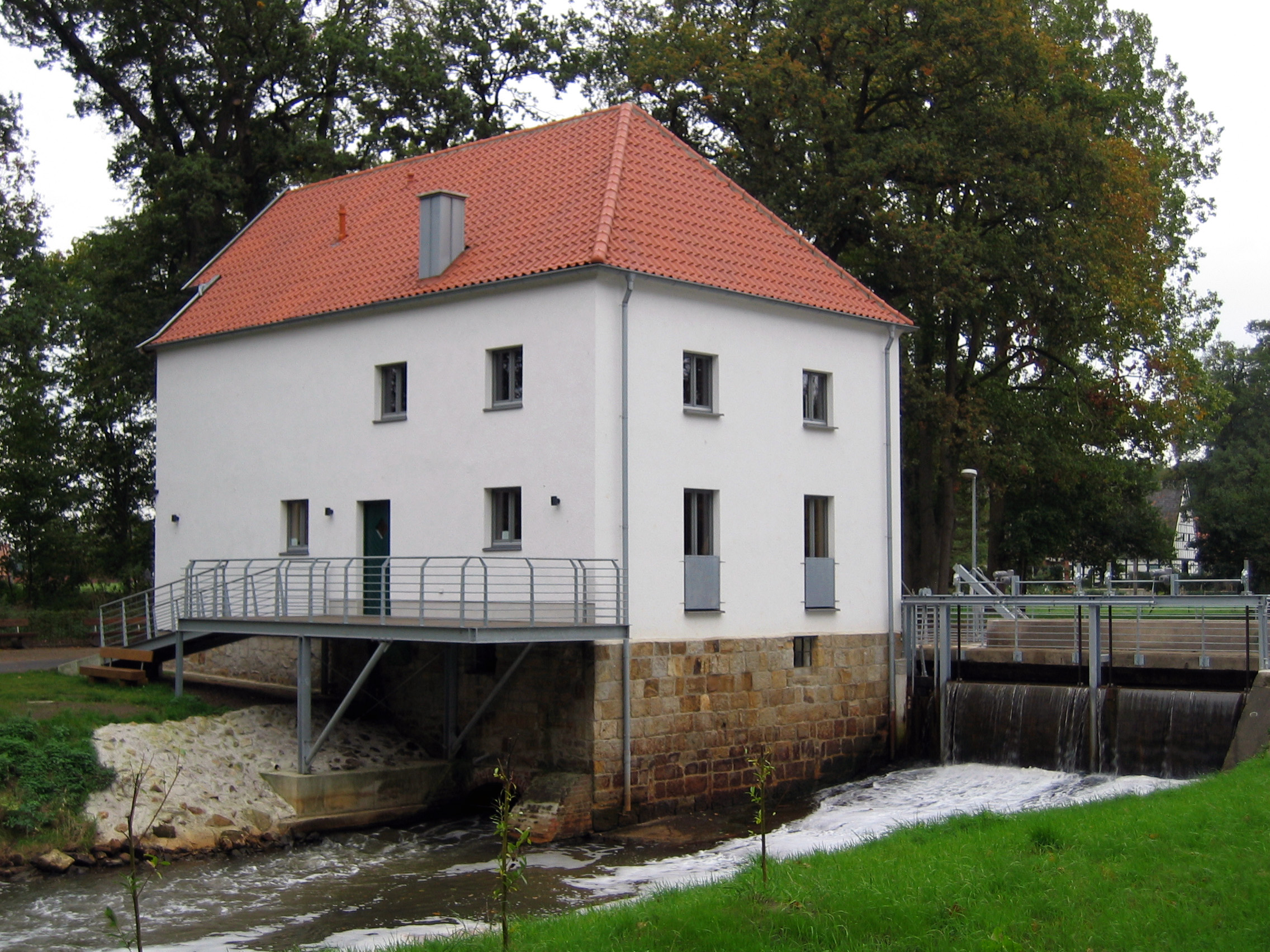 Reinings Mühle in Dreierwalde This image shows a heritage building in Germany, located in the North Rhine-Westphalian city Hörstel (no. A 162).